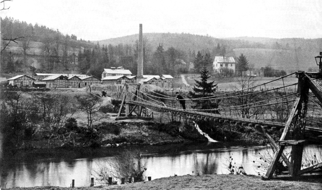 Betriebsanlagen der Grube Castor 1895